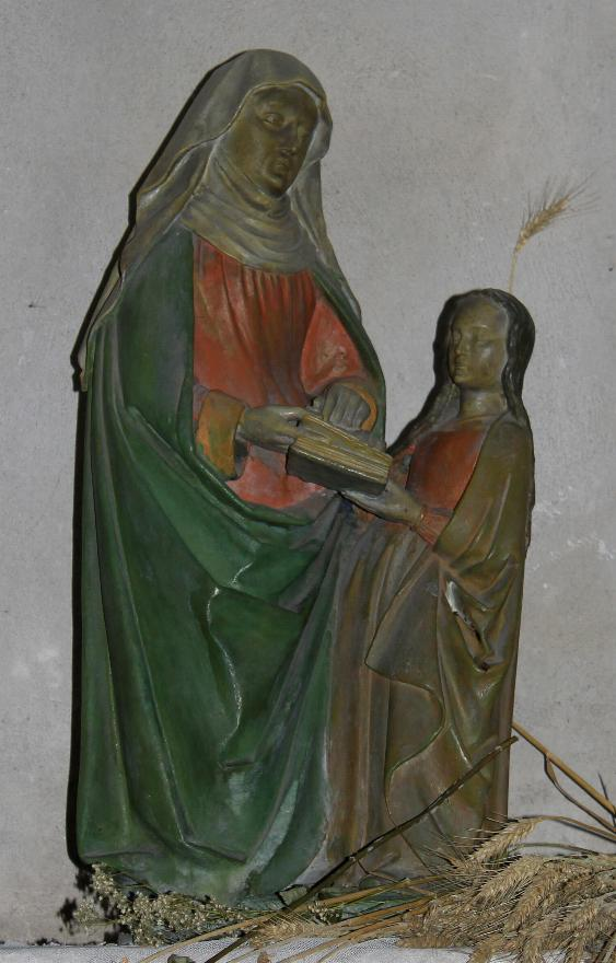 Le Veurdre (03) église St Hippolyte Statue de Ste Anne XVIème